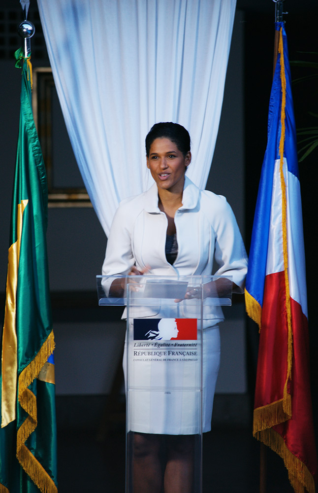 Alexandra Baldeh Loras, por Tinko Czetwertynski.